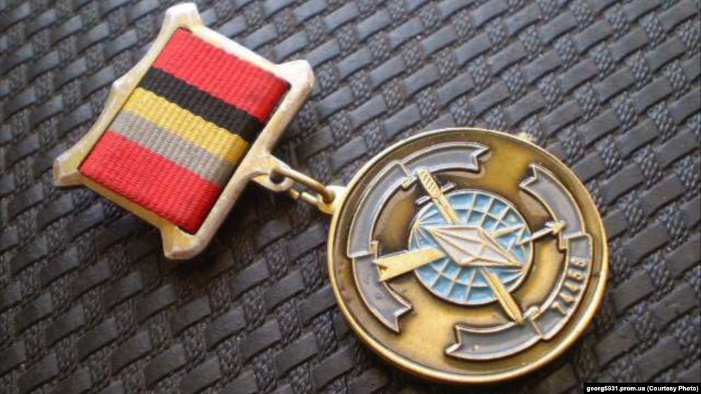 Нагрудный знак ЦОКО